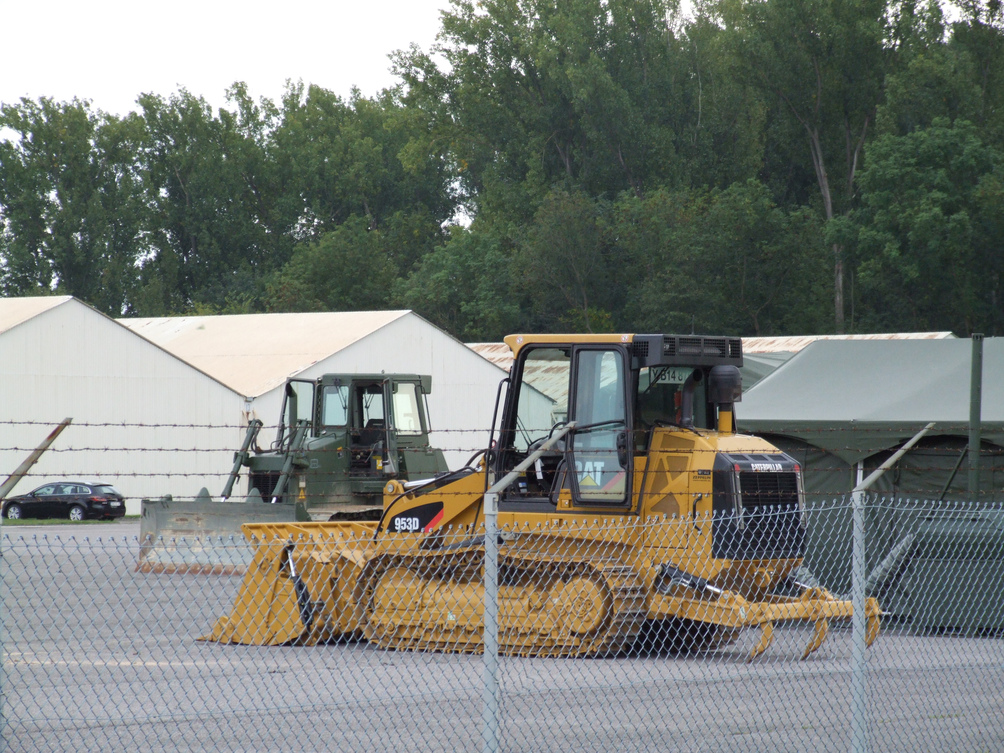 Caterpillar Bulldozer am Wasserübungsplatz Reffental des Spezialpionierbataillon 464